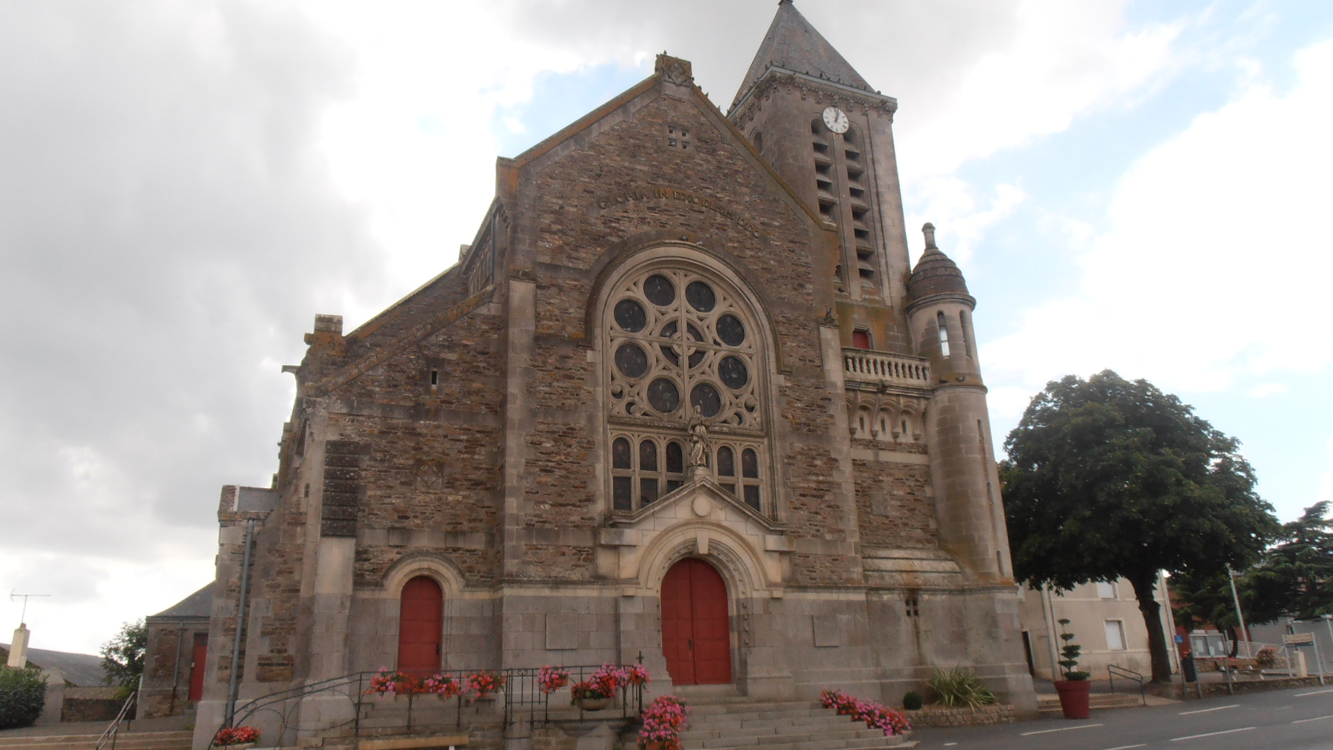 L'église du village de Belligné, en Loire-Atlantique (France).